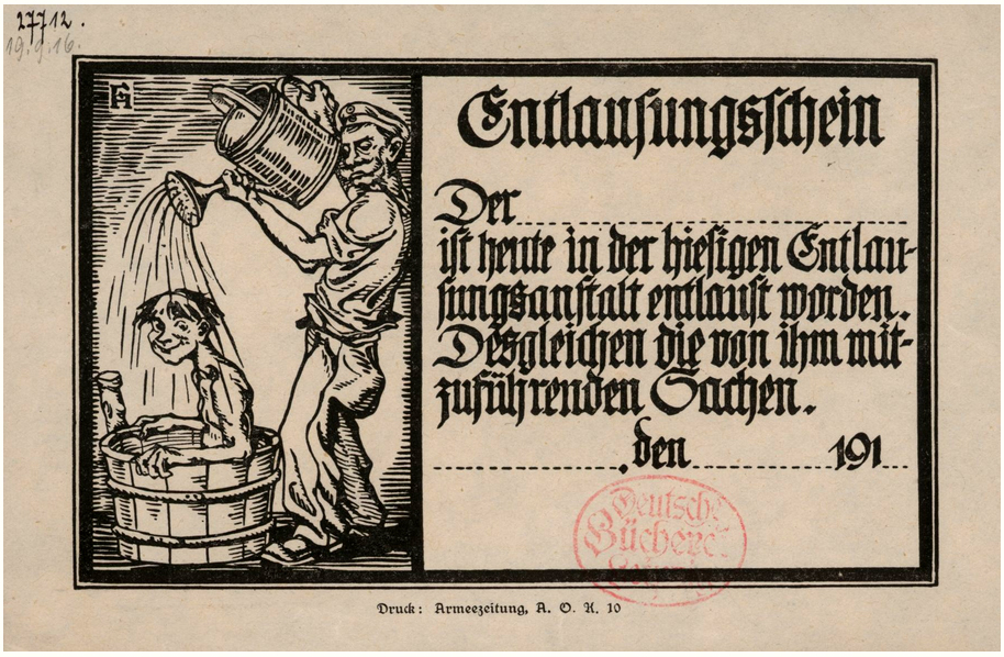 Entlausungsschein aus der Zeit des Ersten Weltkrieges, gedruckt von der Armeezeitung, A. O. K. 10, um 1916, mit einer Karikatur von Fred Hendriok (Künstlersignatur FH) mit einem nackten Soldaten in einem Holzbottich, der von einem anderen Soldaten mit einem Entlausungsmittel aus Gießkanne übergossen wird. Im linken Feld der Text „Entlausungsschein / Der ______________ / ist heute in der hiesigen Entlaus- / sungsanstalt entlaust worden. / Desgleichen die von ihm mit- / zuführenden Sachen. / ____________, den _________ 19__ “ Das mit rotem Besitzstempel der Deutschen Bücherei in Leipzig ist Teil der Weltkriegssammlung der Deutschen Nationabibliothek ...